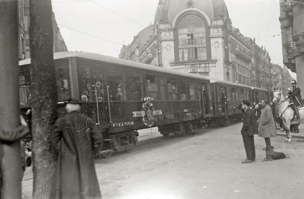 Título original: Inauguración del tren del Urola (7/16) Localización: San Sebastián (Guipúzcoa)